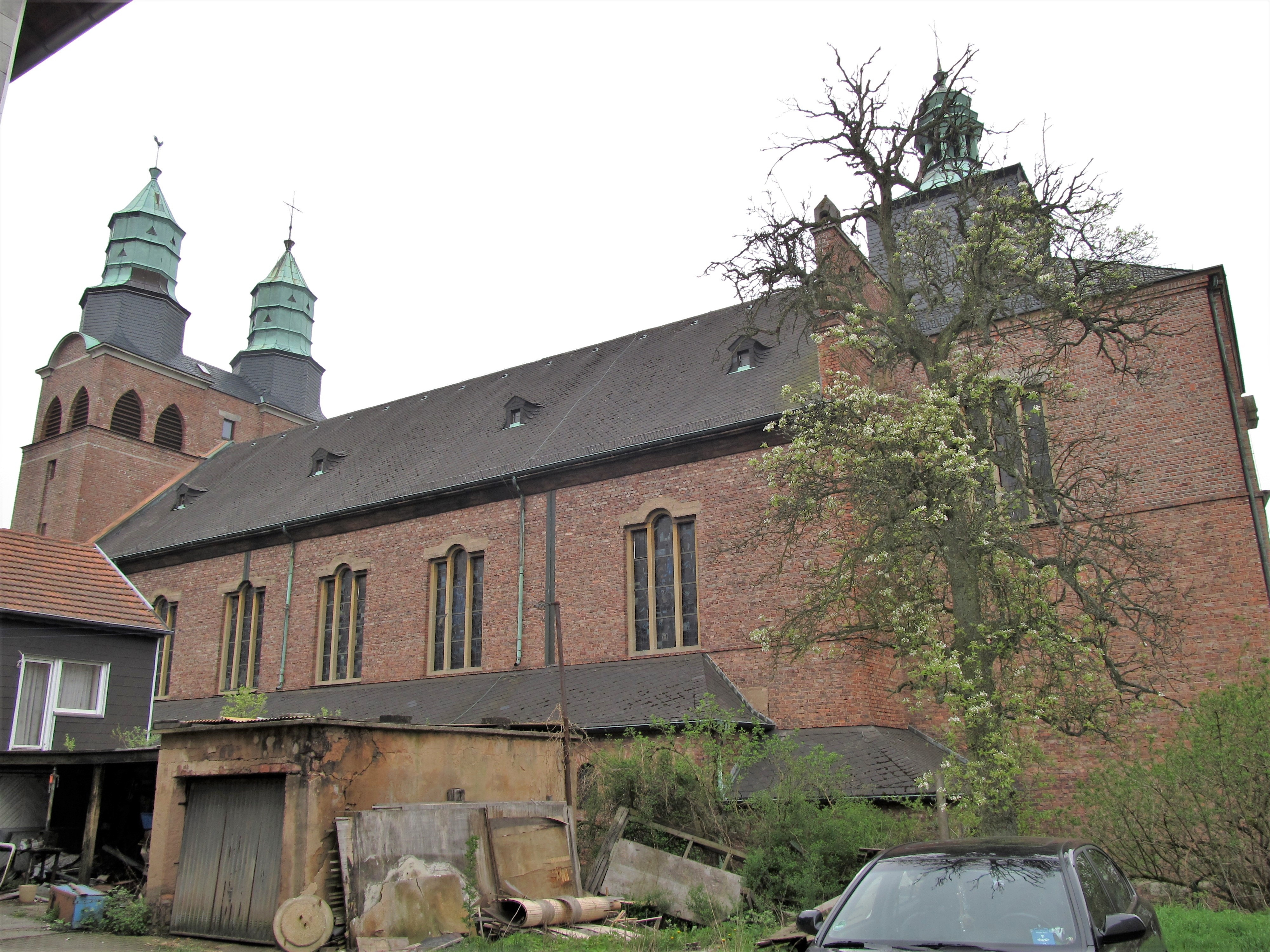 Die katholische Pfarrkirche St. Laurentius in Heiligenwald, einem Ortsteil der Gemeinde Schiffweiler, Landkreis Neunkirchen, Saarland